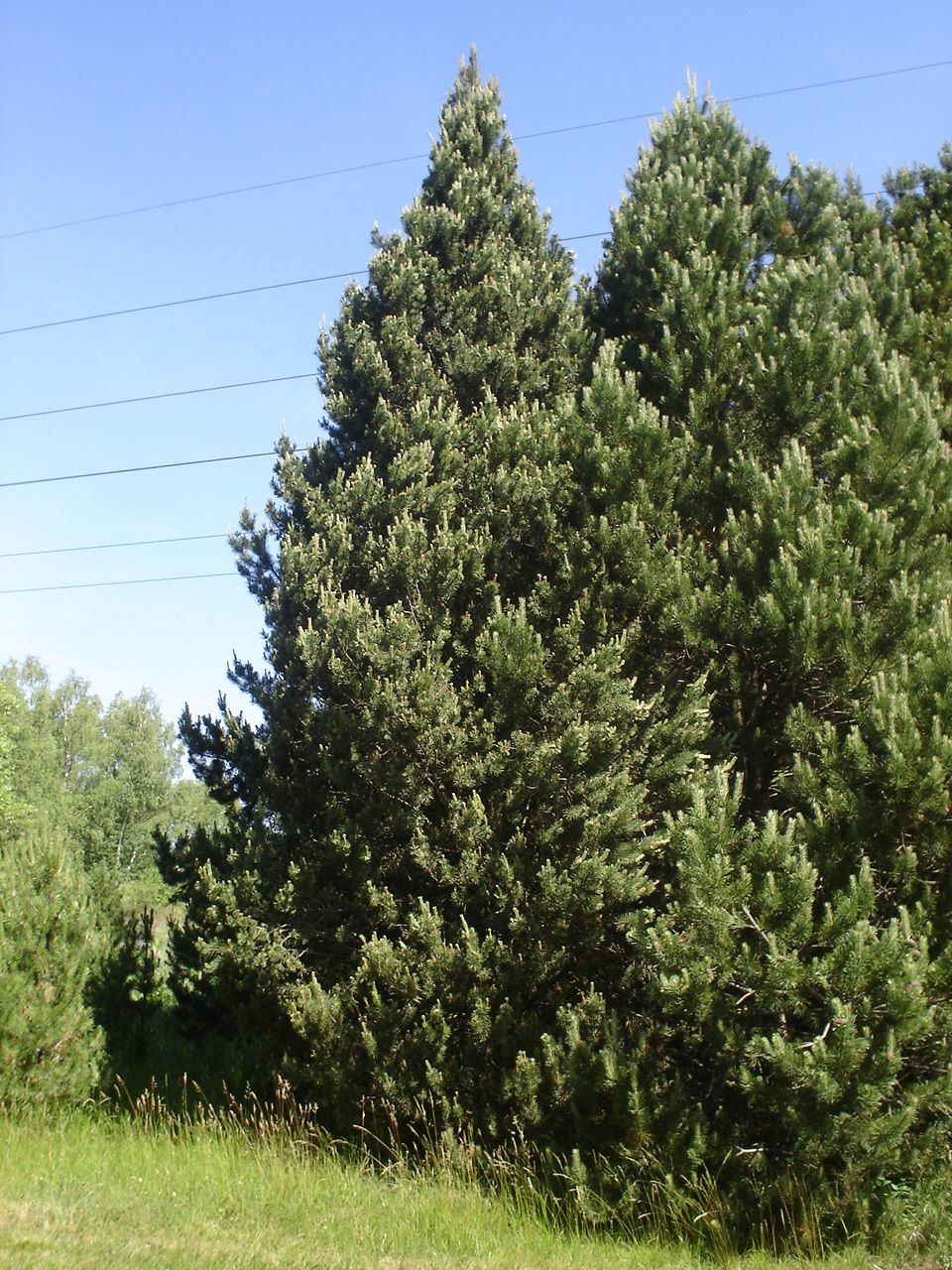 Borovice blatka (původ Žofinka, JČ) v Arboretu Sofronka (Plzeň - Bolevec).